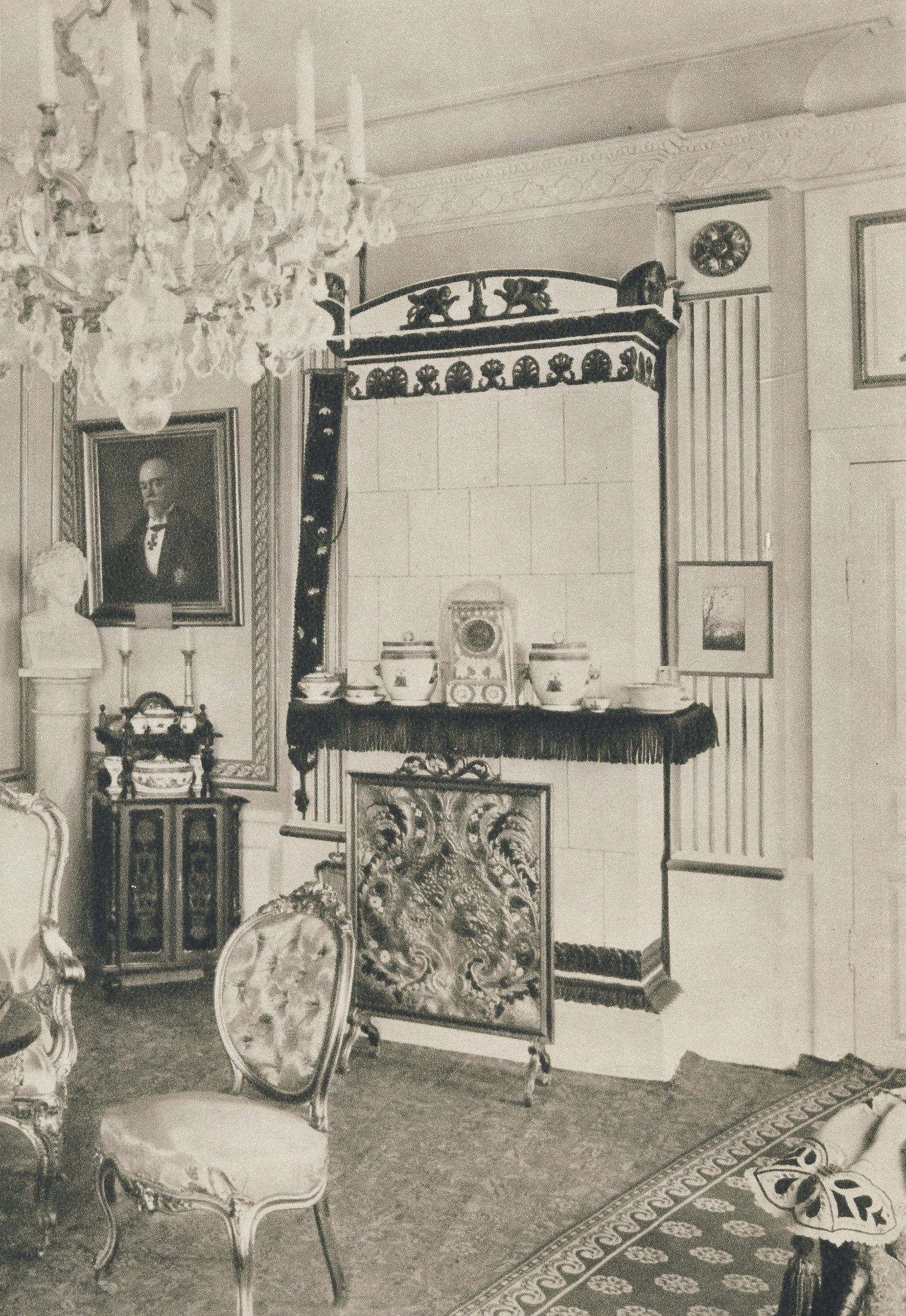 "Clason-Hebbeska huset" vid Skeppsbron 18 i Stockholm, interiör